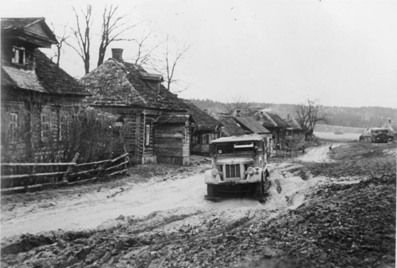 Scherl: An der Sowjetfront: Verschlammte Strasse im Raum von Moskau. PK-Aufnahme: Kriegsberichter: Britting 10322-41 Nov. 41